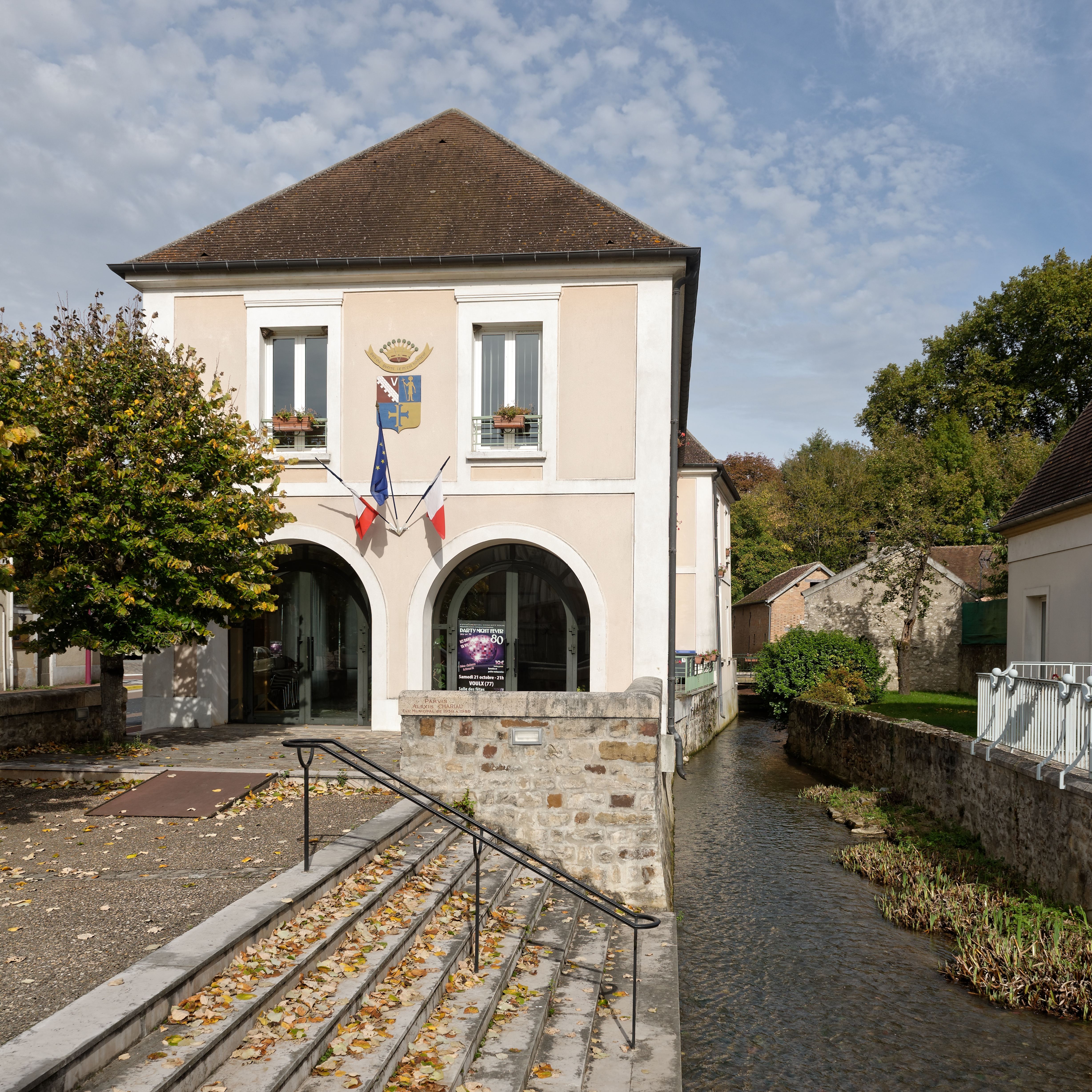 Rivière Orvanne et façade est de la mairie de Voulx, en Seine-et-Marne, région Île-de-France.